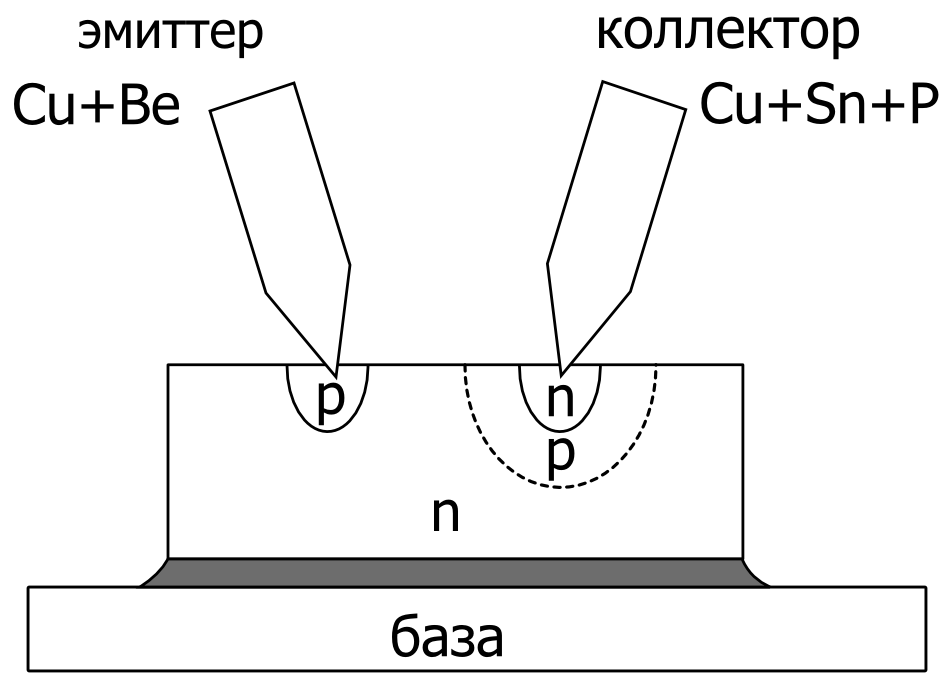 Структура первого серийного контактного транзистора Type A. Контакты из фосфористой бронзы, создавали островки проводимости n-типа. Островки p-типа создаются при электротренировке контактов (практически независимо от примесей в электродах).